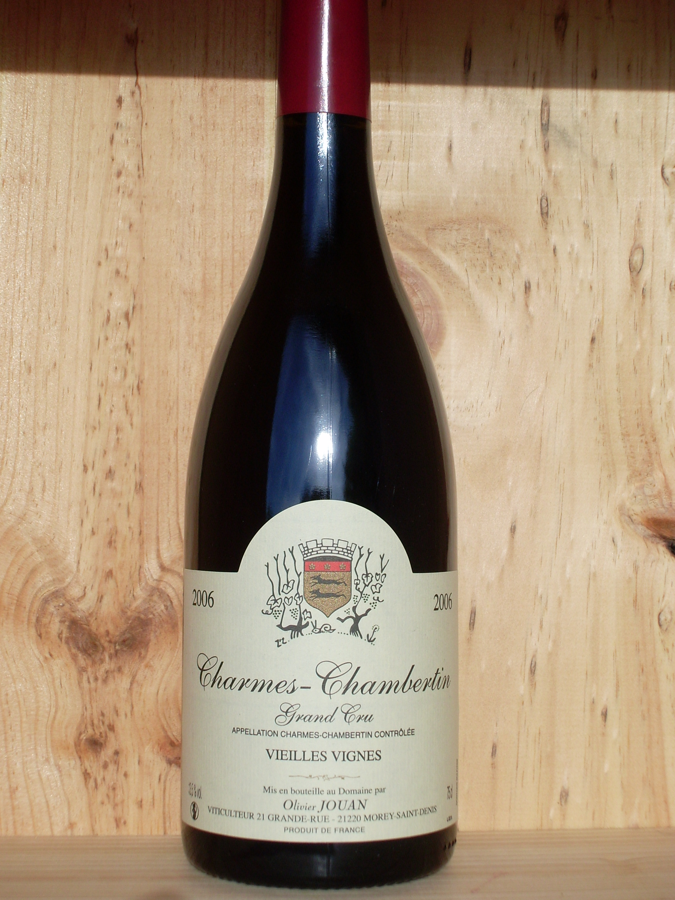 Charmes Chambertin Grand Cru 2006 Domaine Jouan Olivier